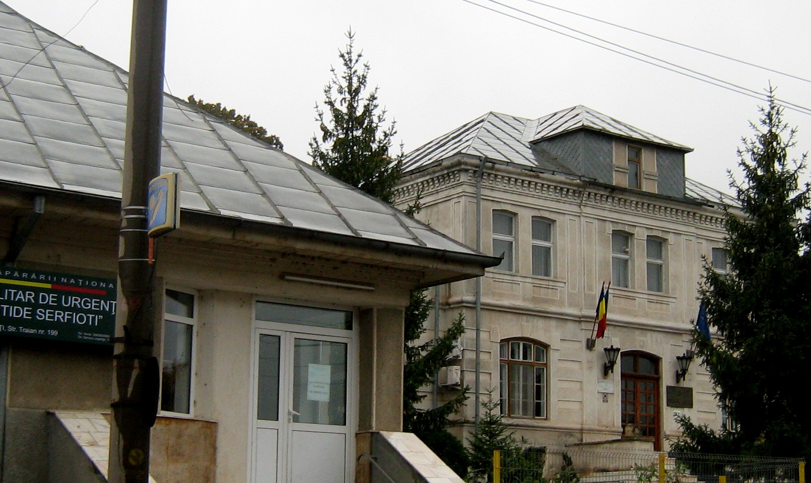 Spitalul Militar dr Aristide Serfioti